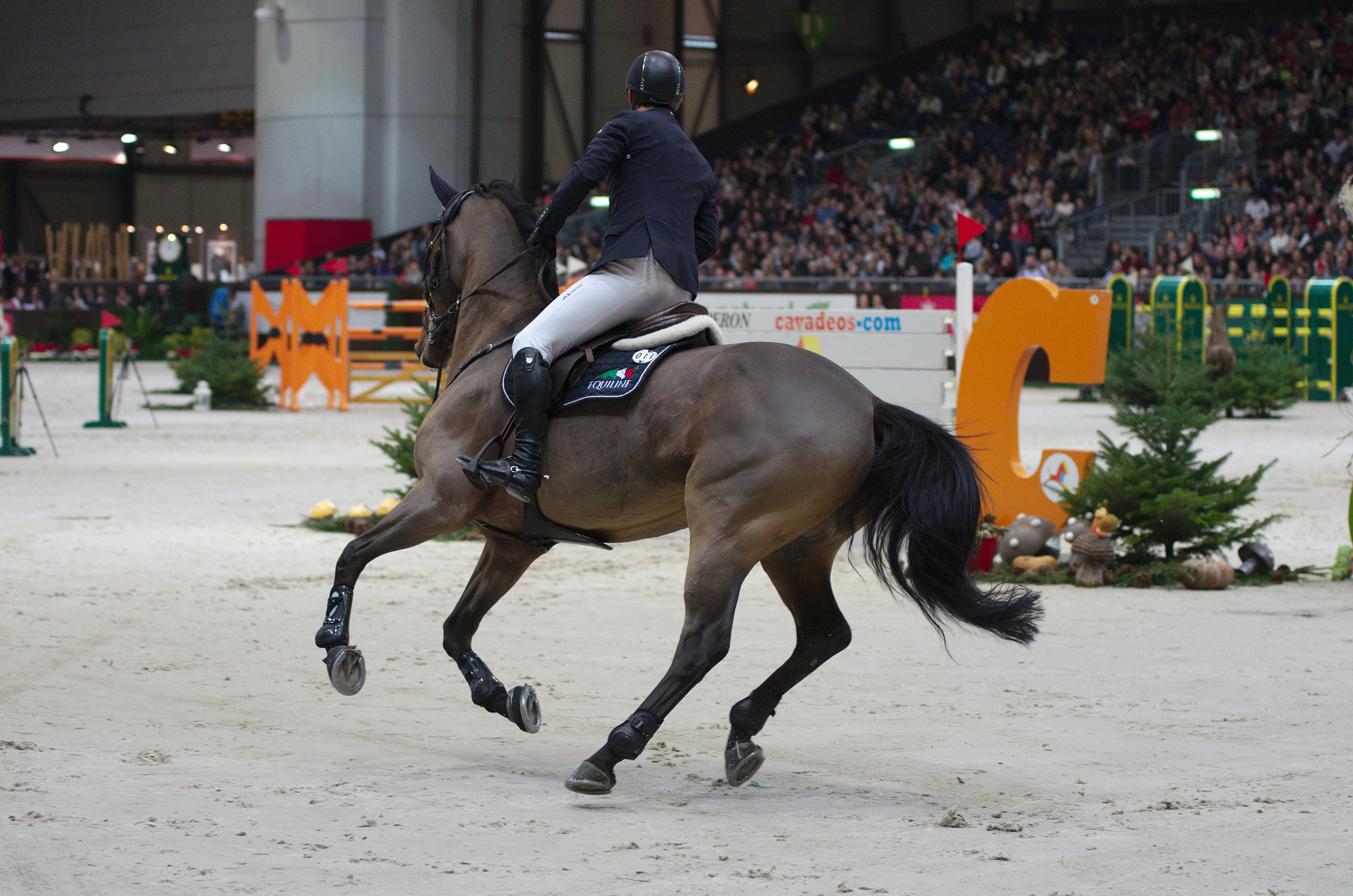 54eme CHI de Genève - 20141213 - Coupe de Genève - Billy Twomey et Diaghilev